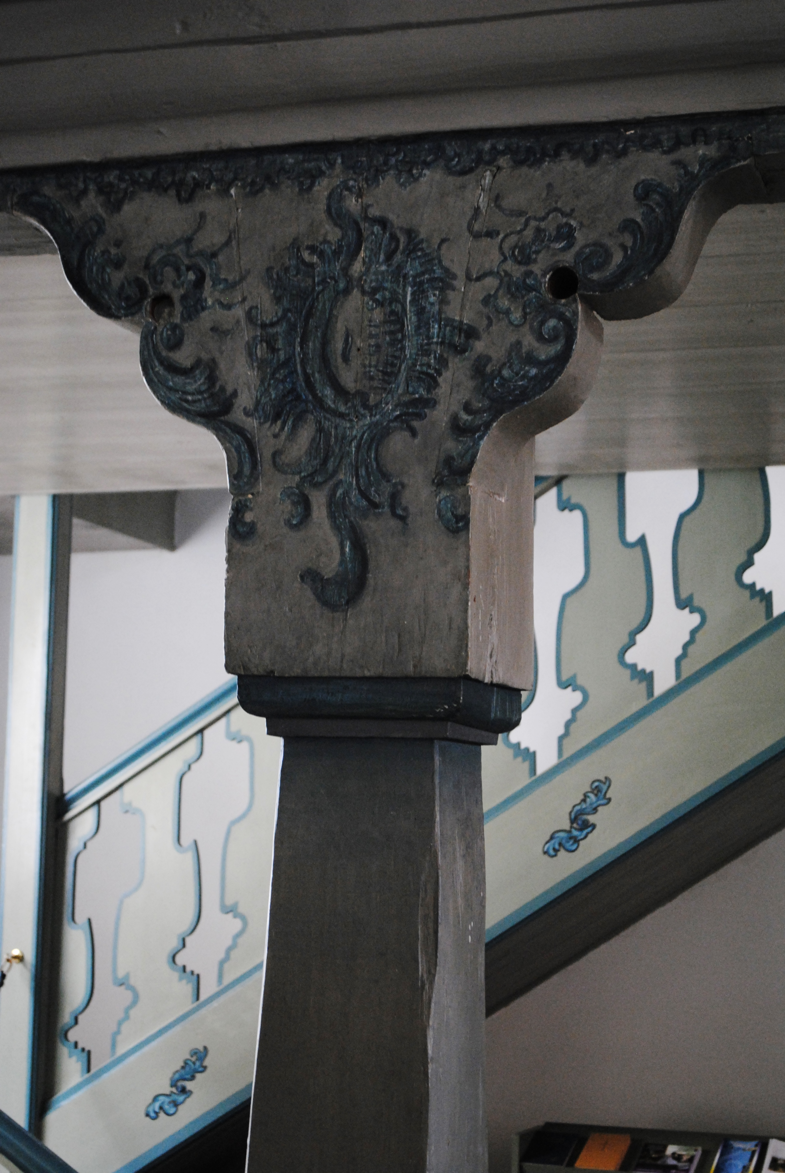 Emporensäule, Kirche, Rüdenhausen